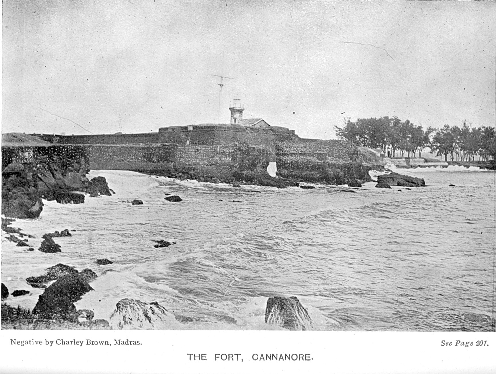 Cannore Fort